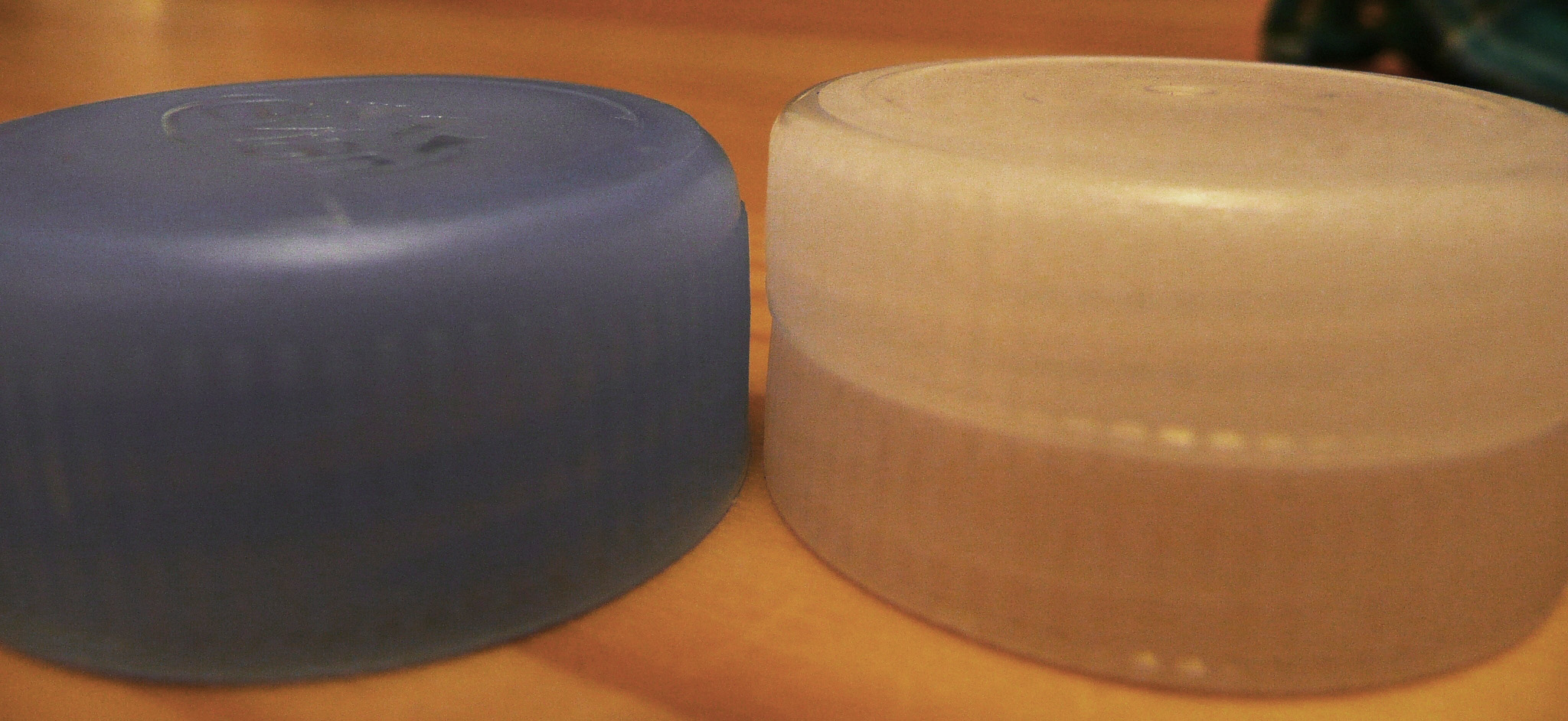 Depuis décembre 2007, diminution du poids des bouchons de bouteille.